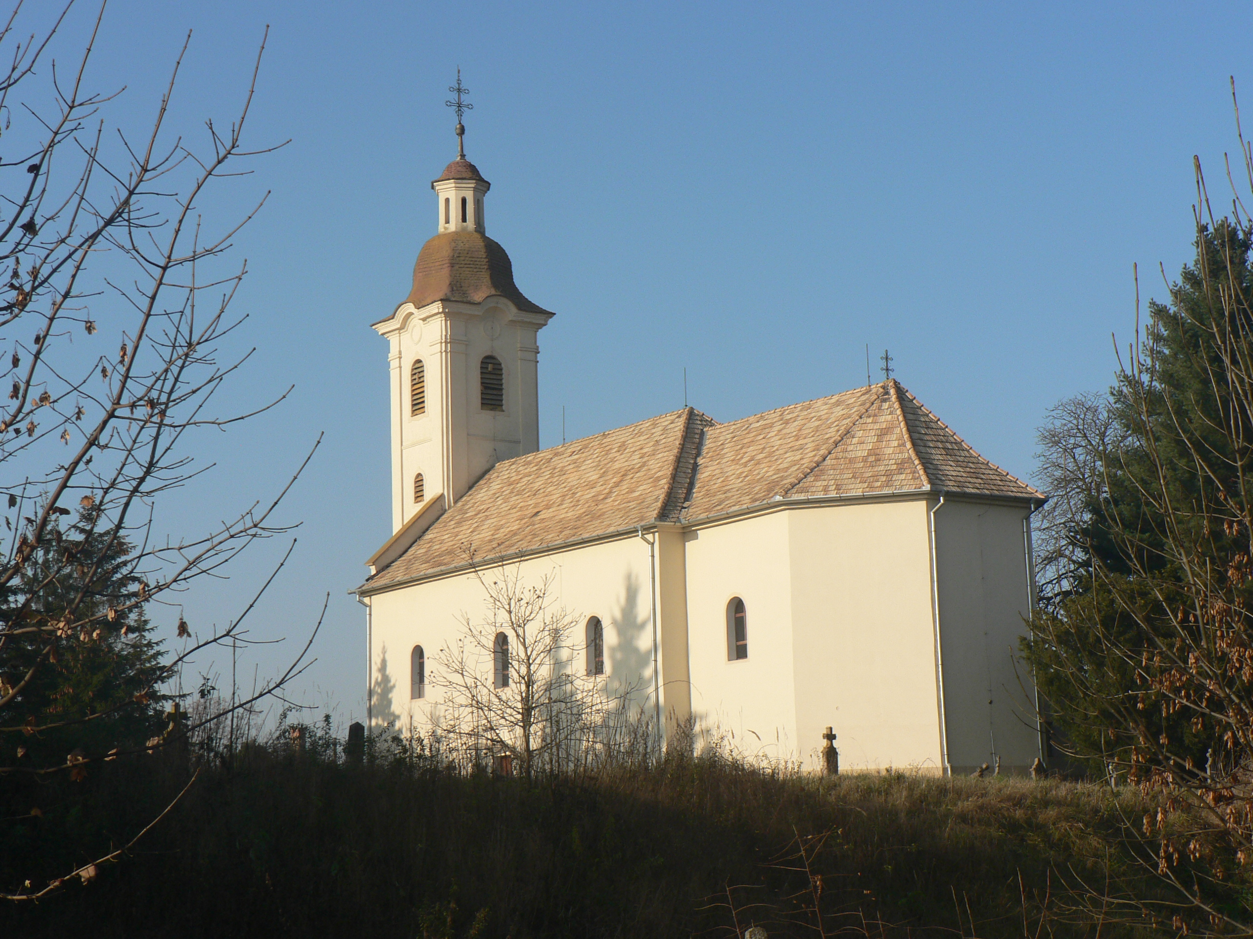 A farnadi katolikus templom (Szlovákia)